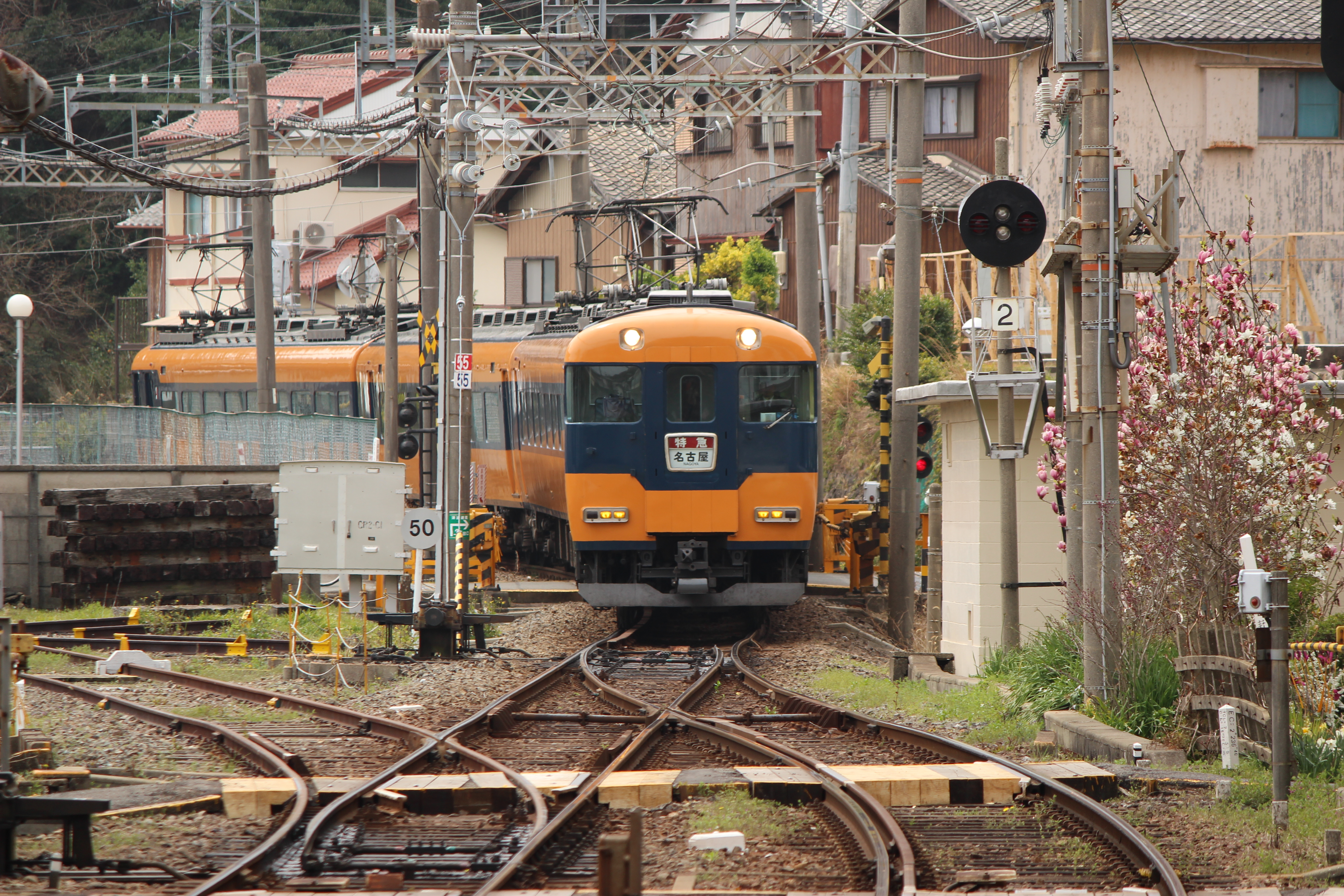 近鉄 志摩赤崎駅構内